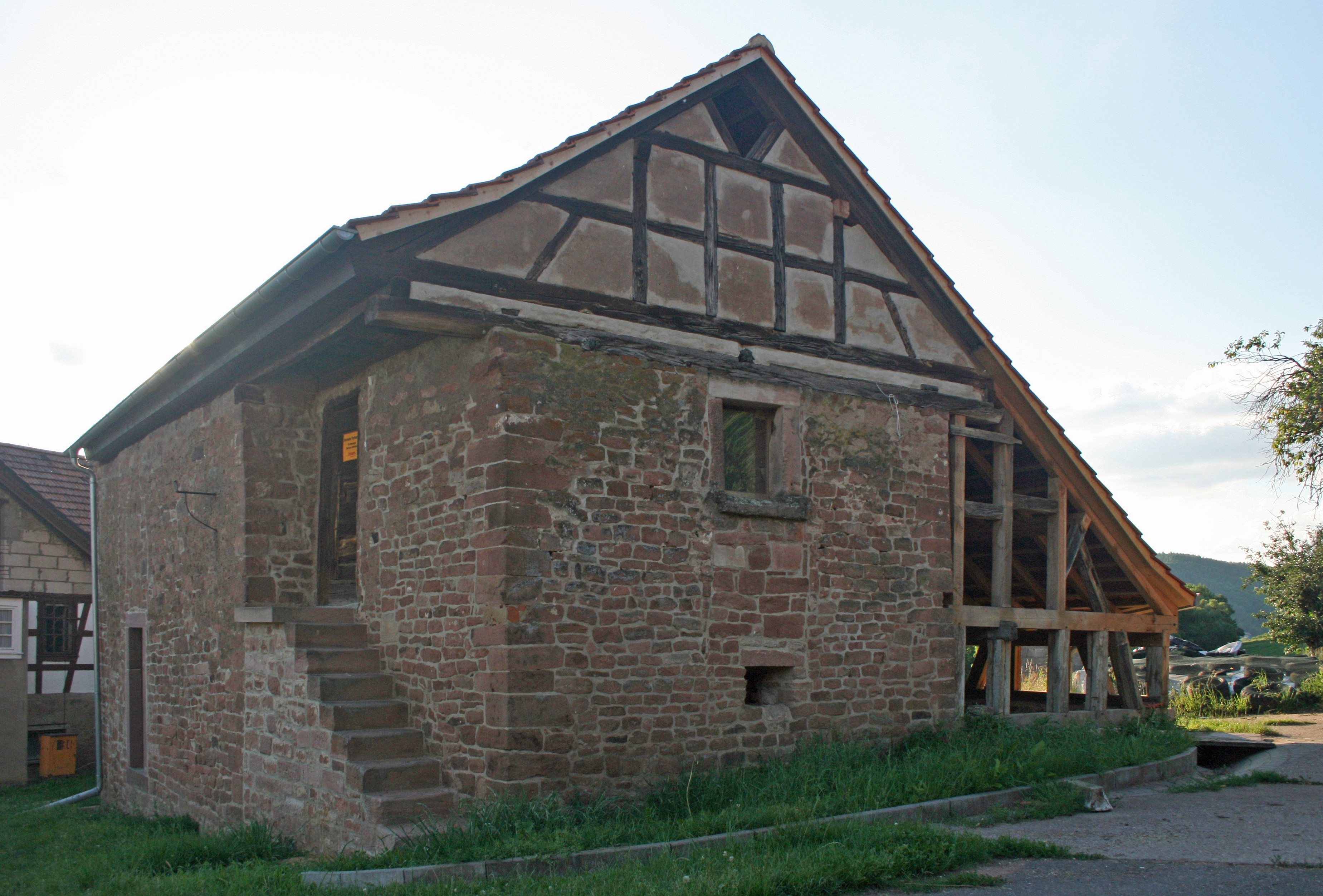 Arnheider Kapelle bei Breuberg - Rai-Breitenbach, Ansicht von SO.